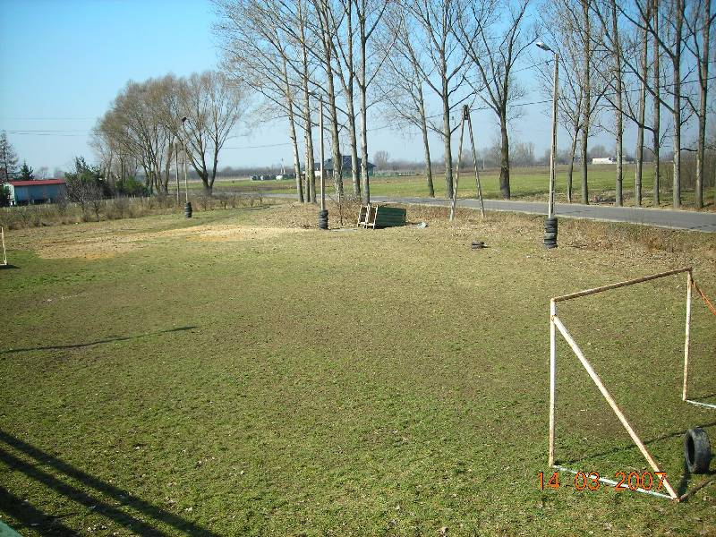 Dziecinów